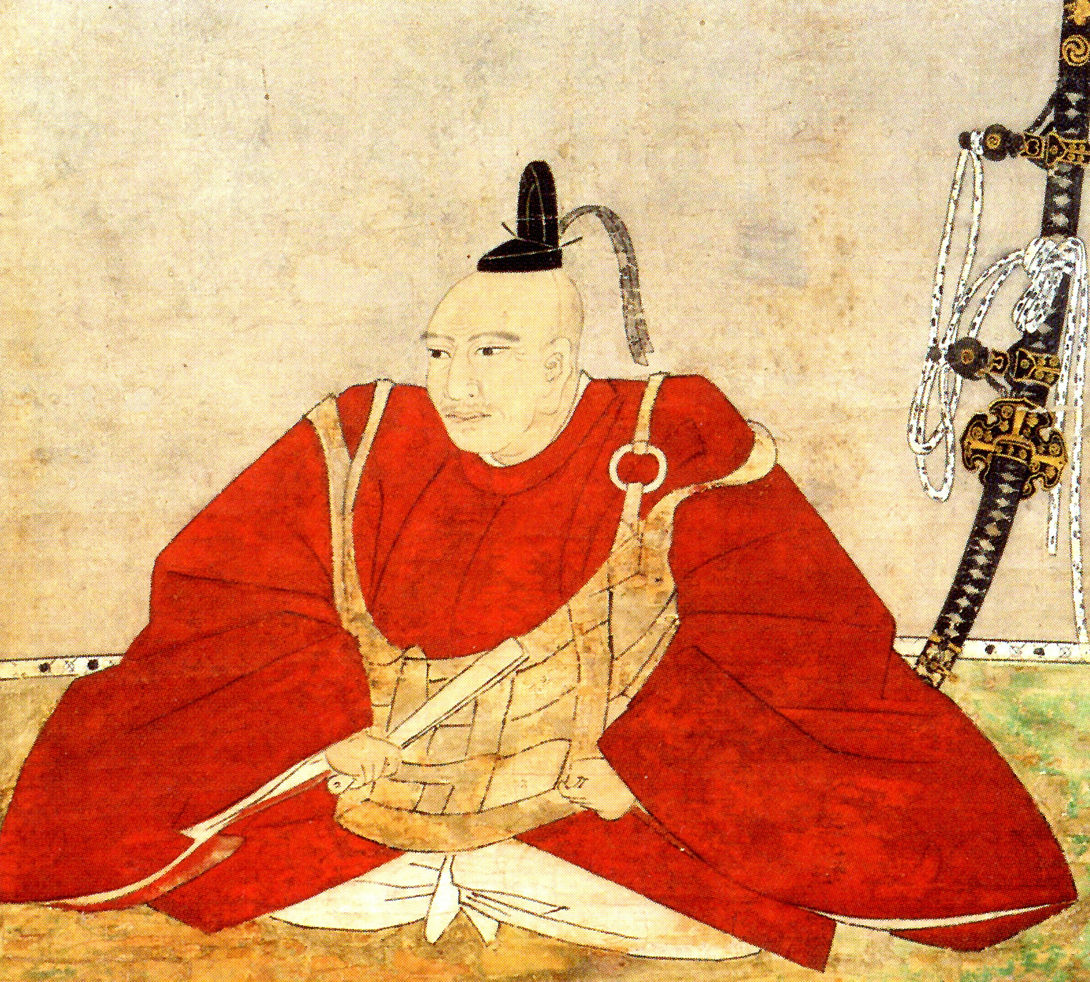 岡部長盛の肖像。